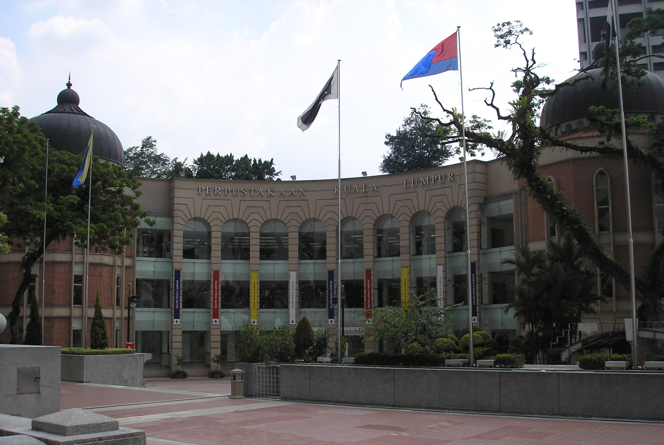 The Kuala Lumpur Library, Merdeka Square, Kuala Lumpur, Malaysia.